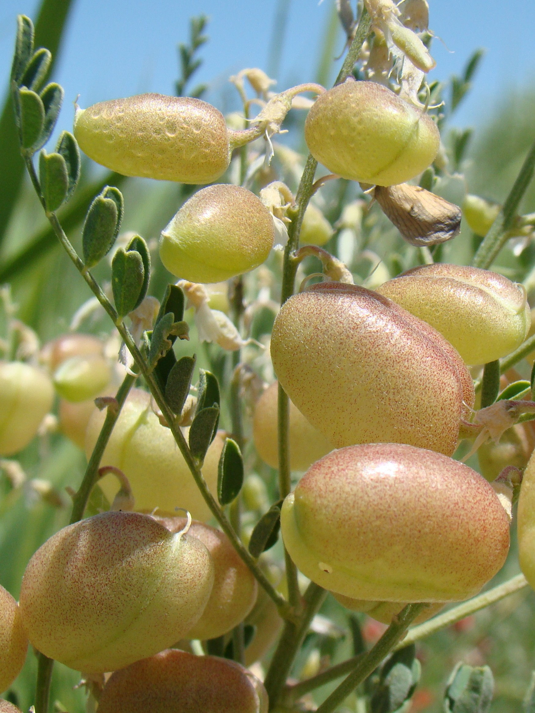 Сферофиза солонцовая (Sphaerophysa salsula). Незрелые бобы. Город Байконур, Казахстан.